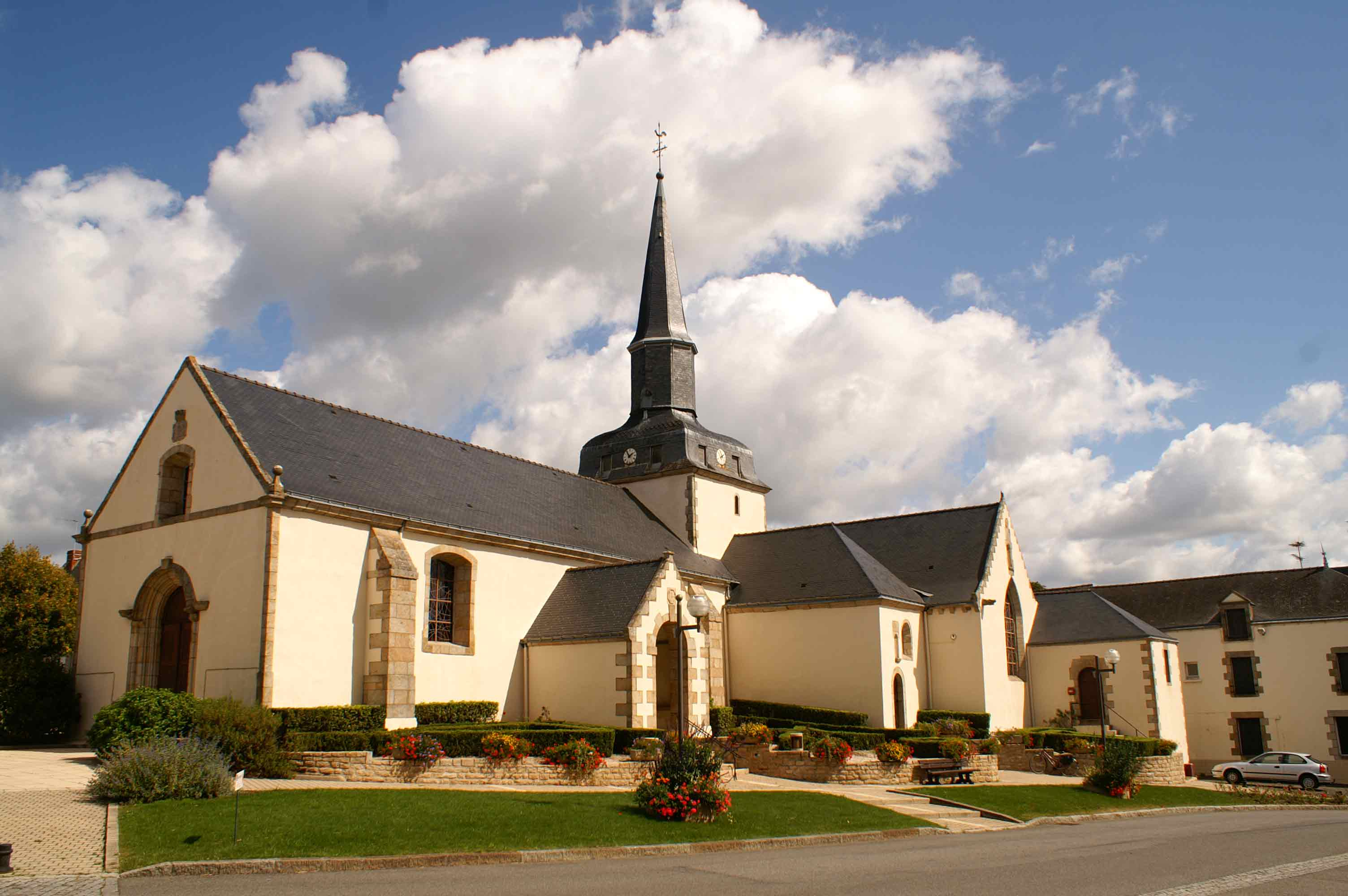 Église de Marzan sur la place principale du bourg.